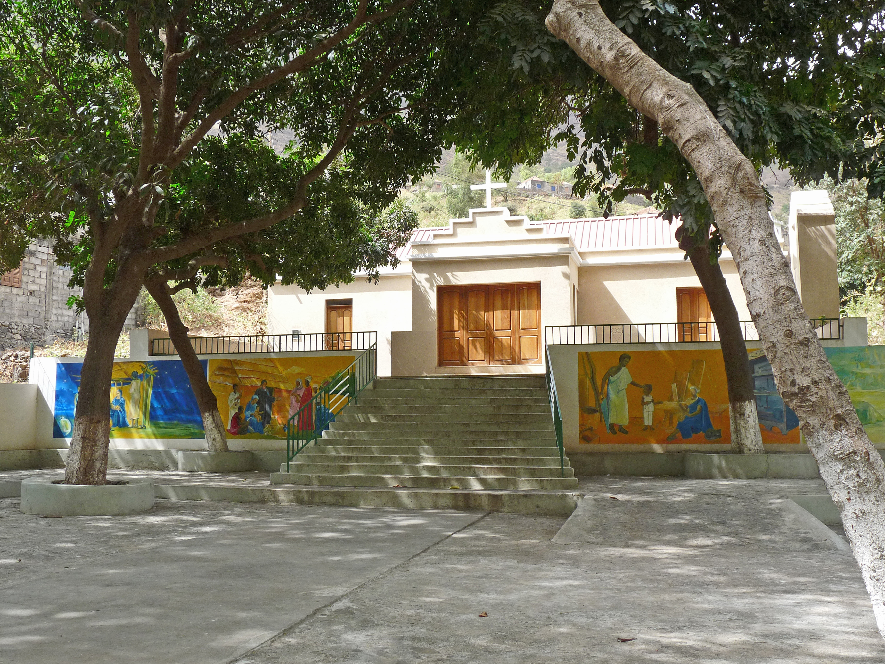 Eglise de Hortelão (île de Santiago, Cap-Vert)